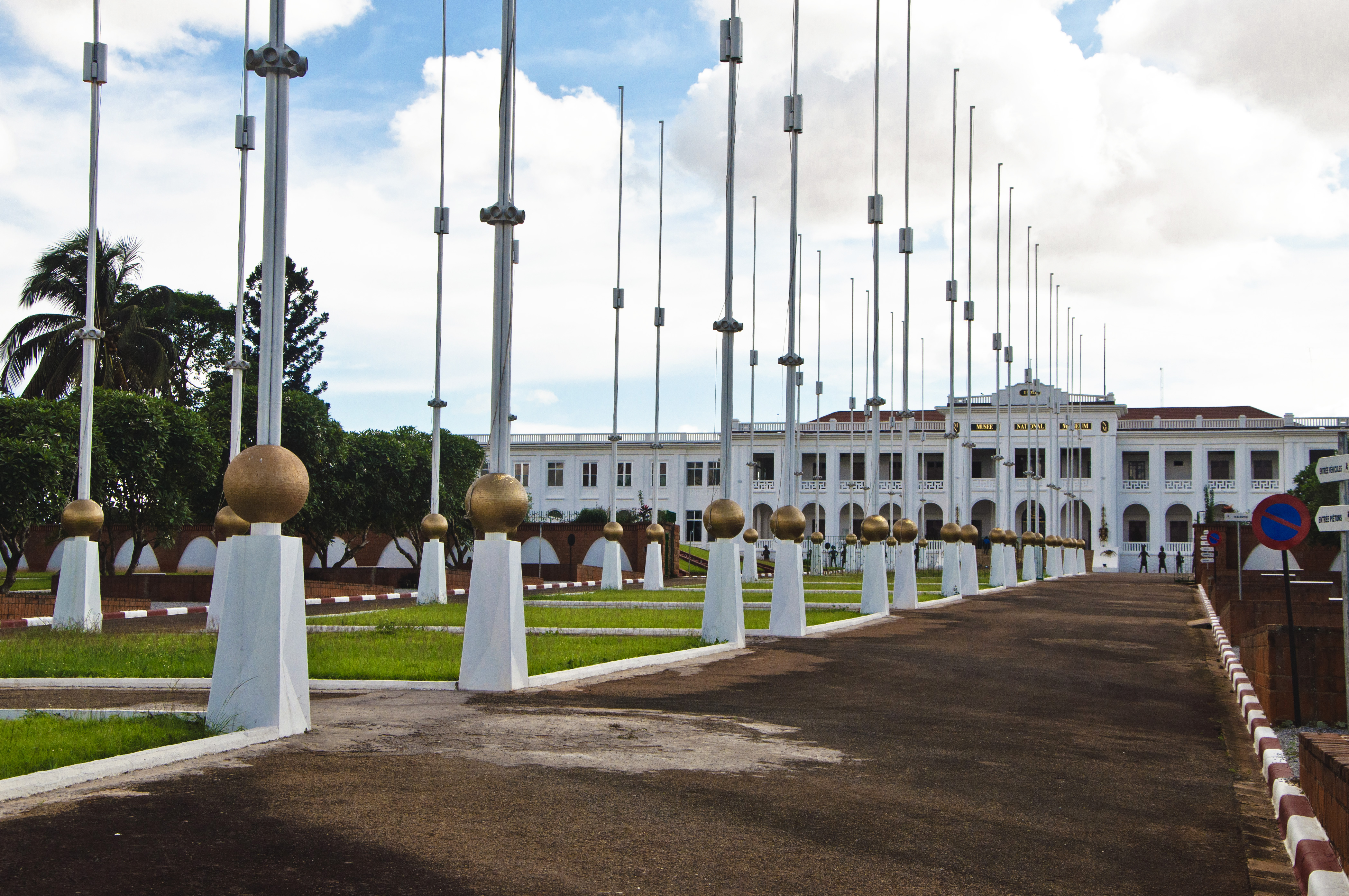 Musée National du Cameroun, Vue principale (Yaoundé)